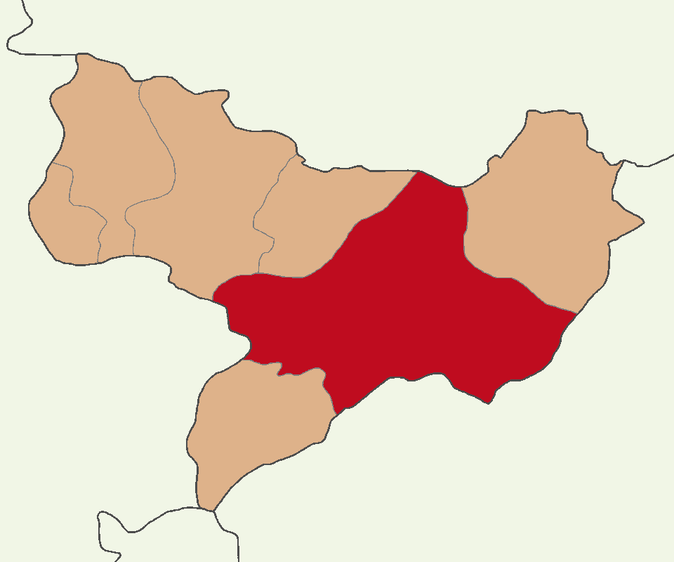 Amasya Merkez ilçesinin konumu